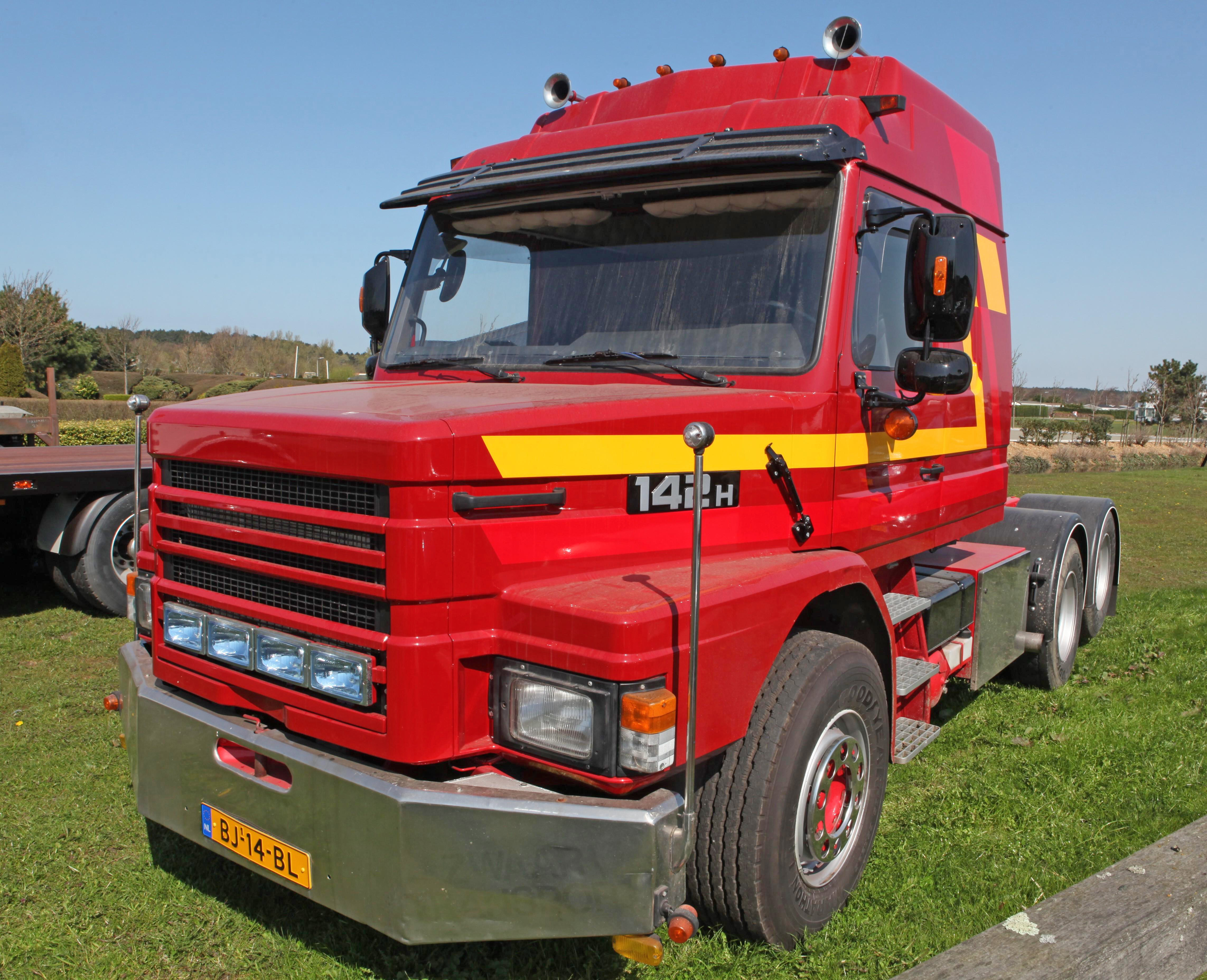 1984 Scania 142 H